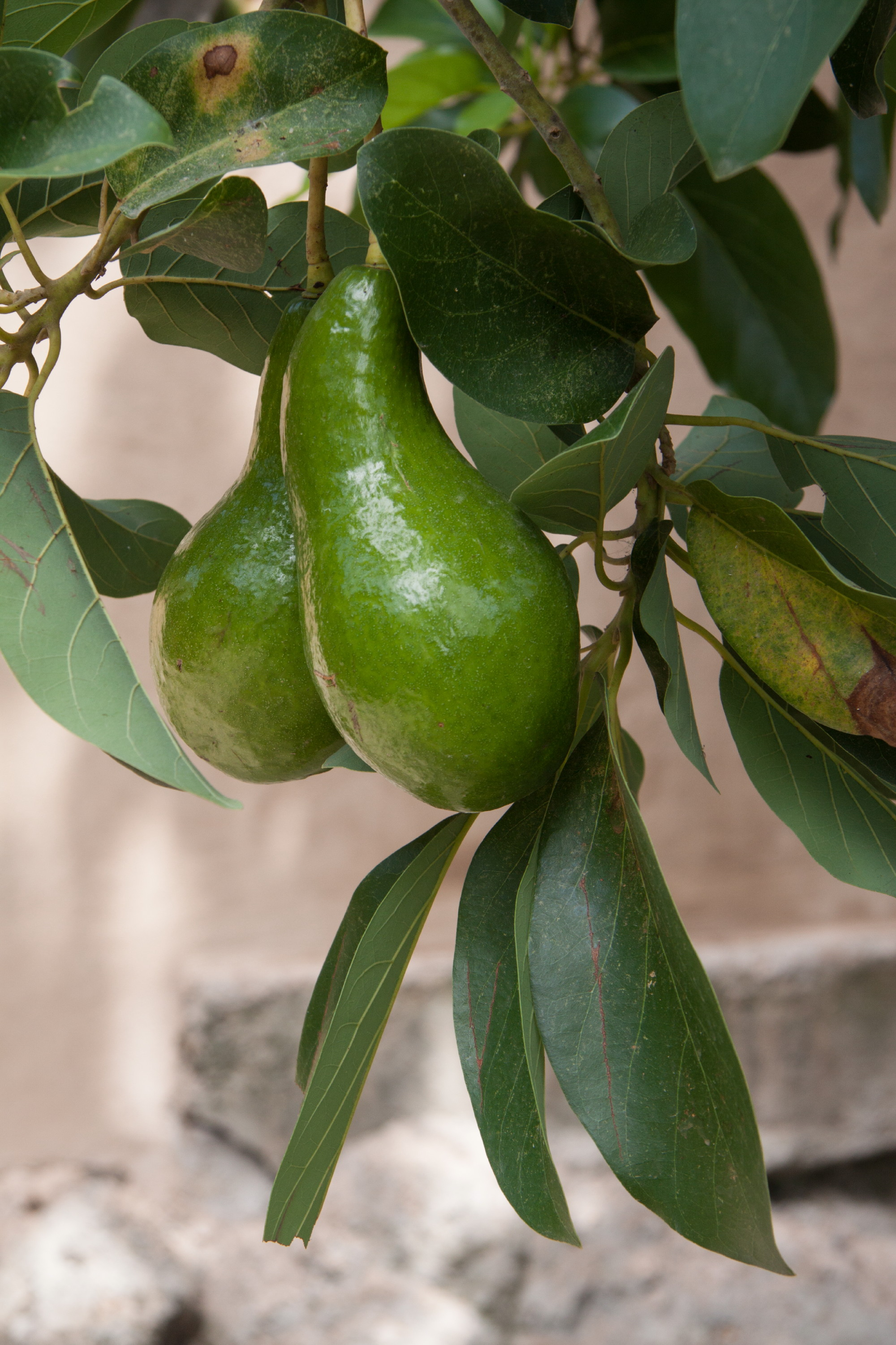 Avocado in Santiago de Cuba